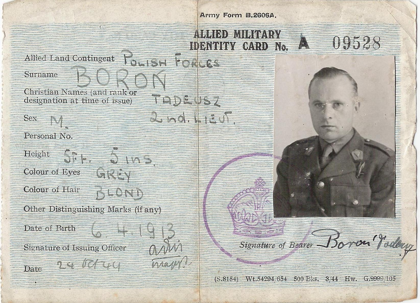 Ppor. Tadeusz Boroń, karta identyfikacyjna oficera Sił Sprzymierzonych w Wielkiej Brytanii, 1944.